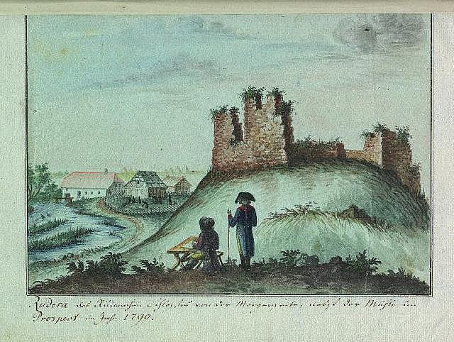 Scan from Johann Christoph Brotze's book Sammlung verschiedner Liefländischer Monumente. Rudera des Ruienschen Schloßes von der Morgenseite, nebst der Mühle im Prospect im Jahr 1790 [G. Bergmann; die Ansicht].